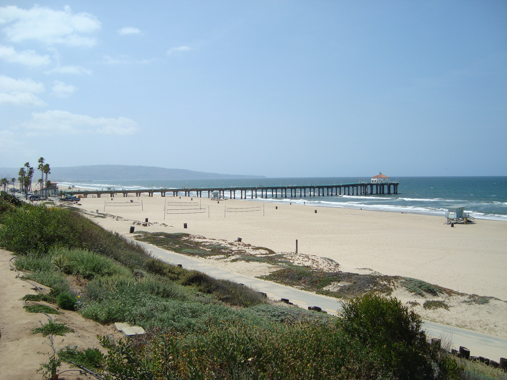 Manhattan Beach